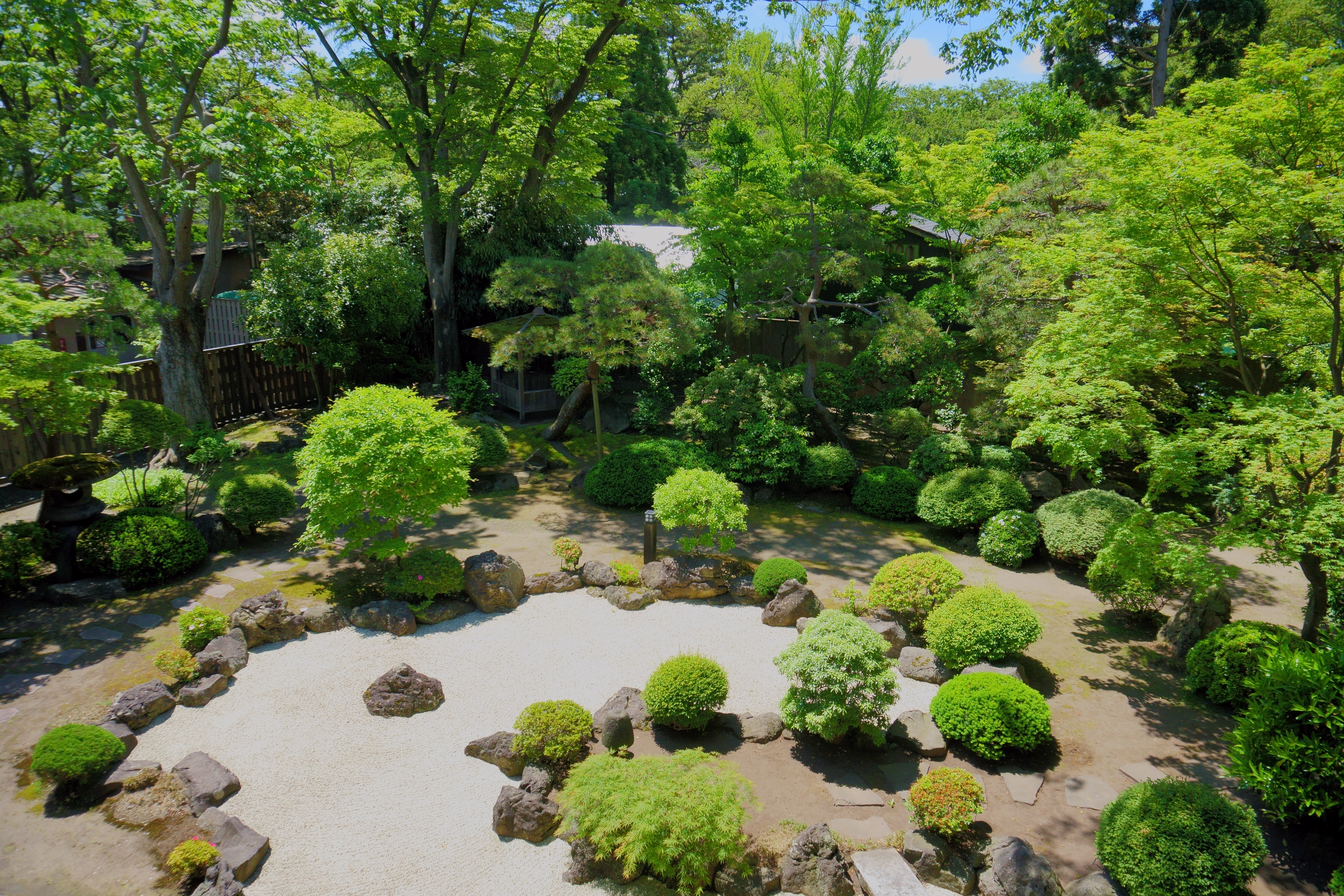 能代市観光交流施設、旧料亭金勇。秋田杉の天然材をふんだんに用いたかつての料亭で、2009年に料亭としては廃業し、施設が市に寄贈された。その後2013年に市の観光交流施設として再オープンしている。国の登録有形文化財に登録された豪奢な建物は、「東洋の木都」と称された工業都市、能代の往時の繁栄を伝える。